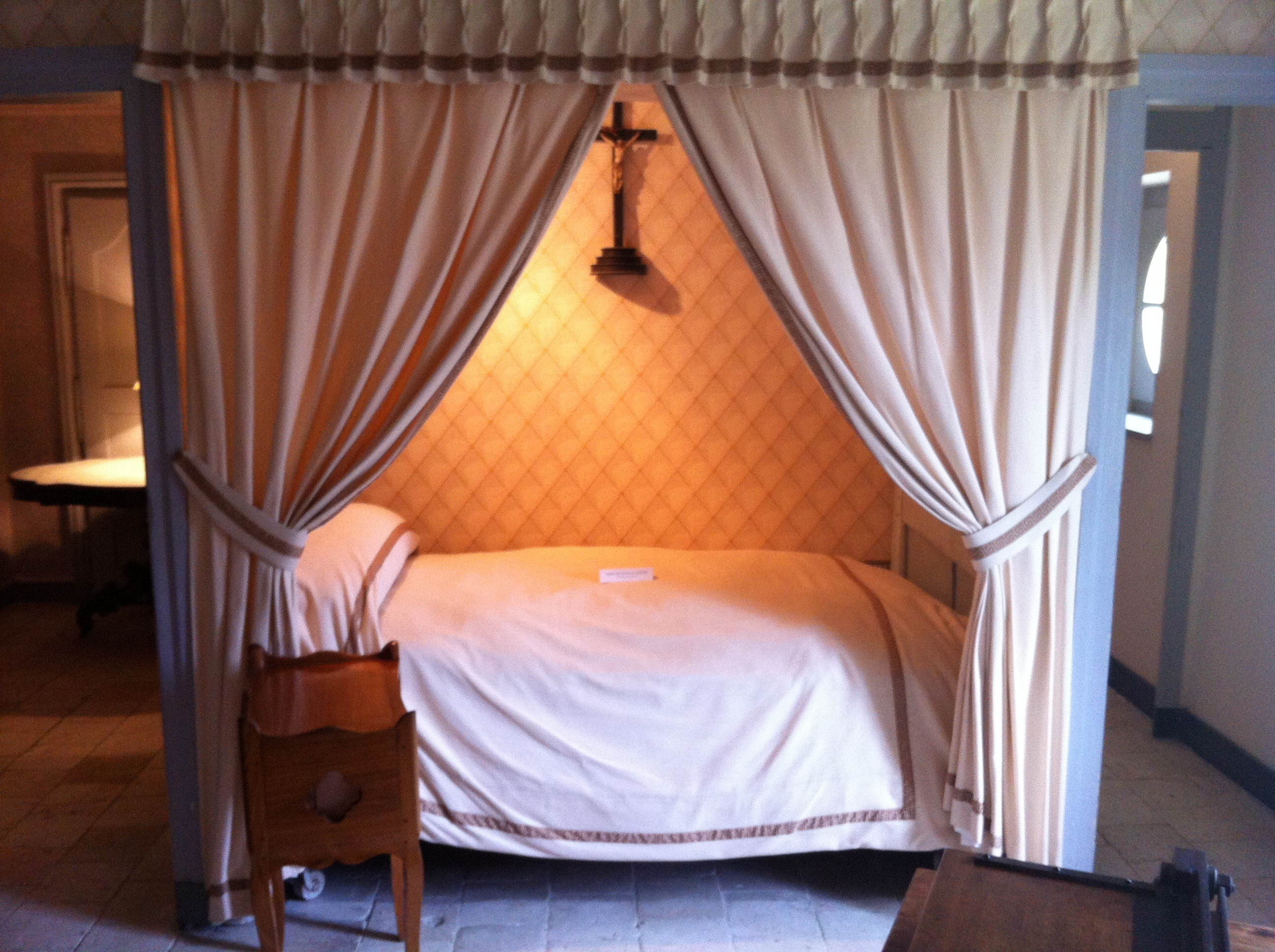 Lit dans la chambre à coucher d'Honoré de Balzac, au château de Saché, France.